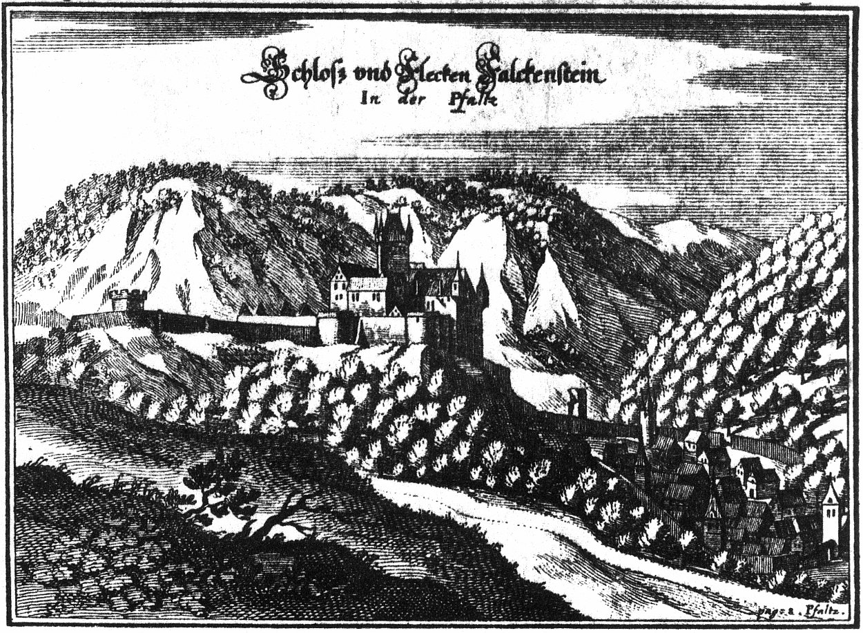 Burg Falkenstein am Donnersberg, Kupferstich nach Merian